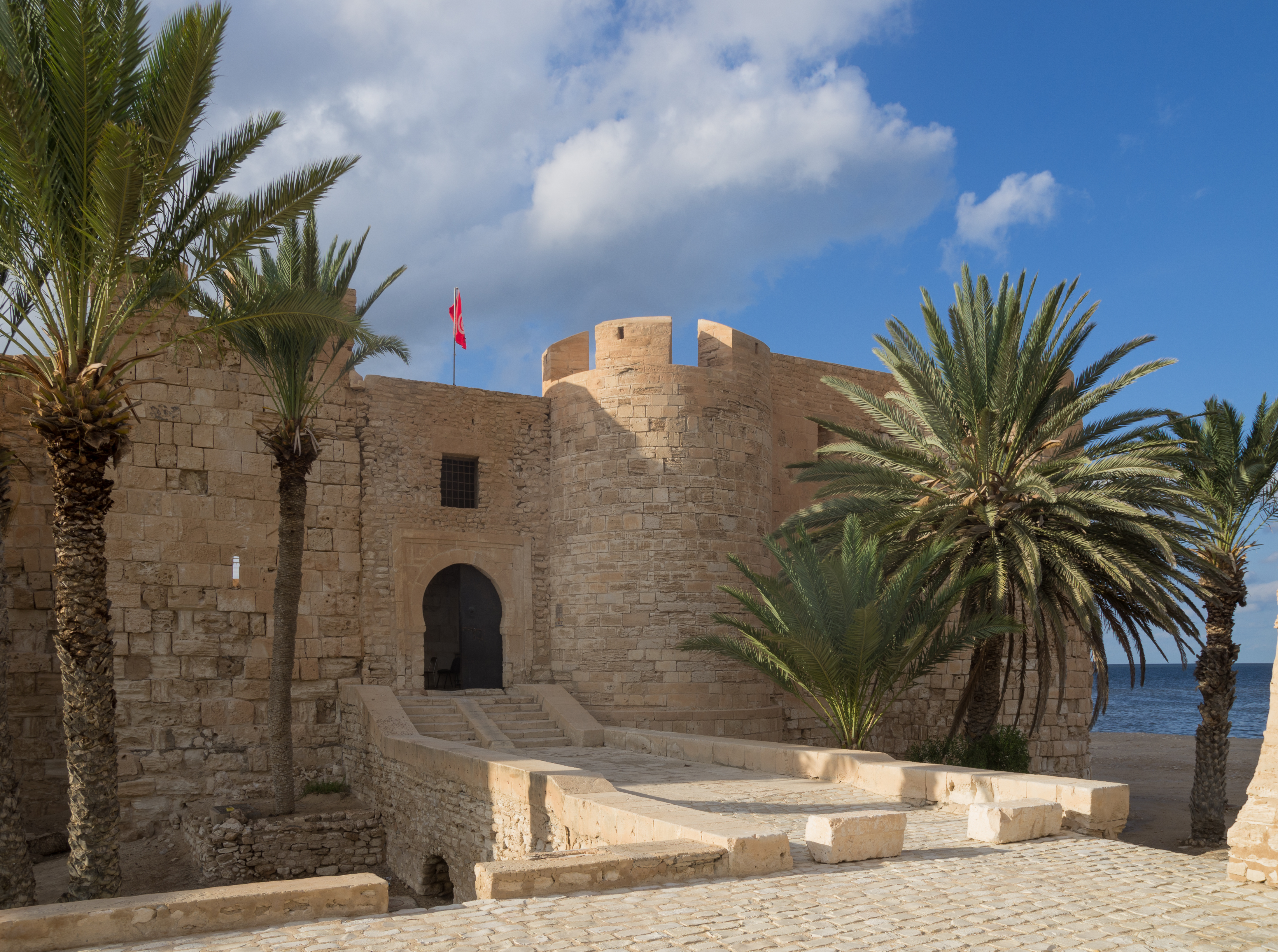 Kasba